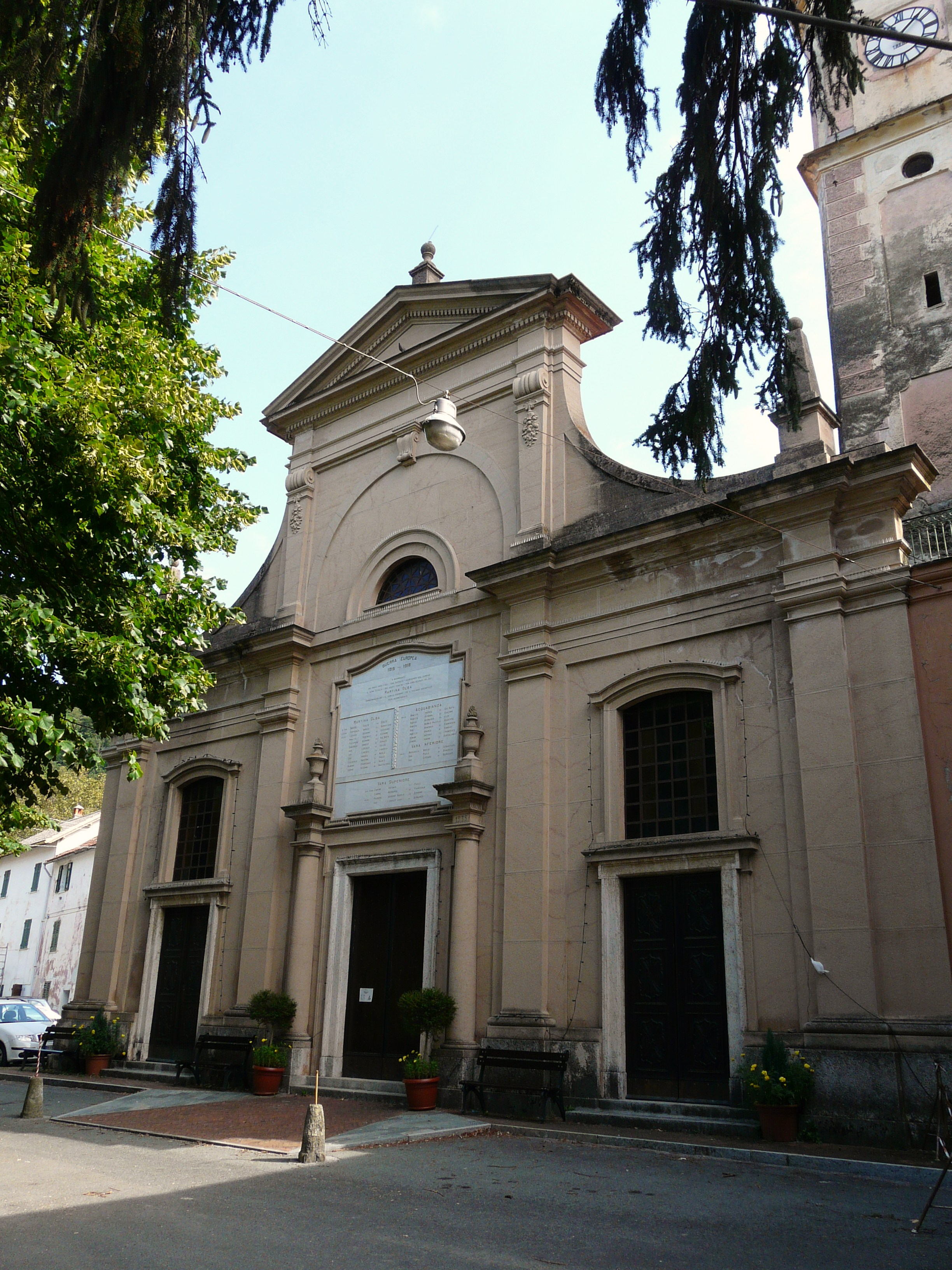 Facciata della chiesa di San Giacomo a Martina d'Olba, Urbe, Liguria, Italia